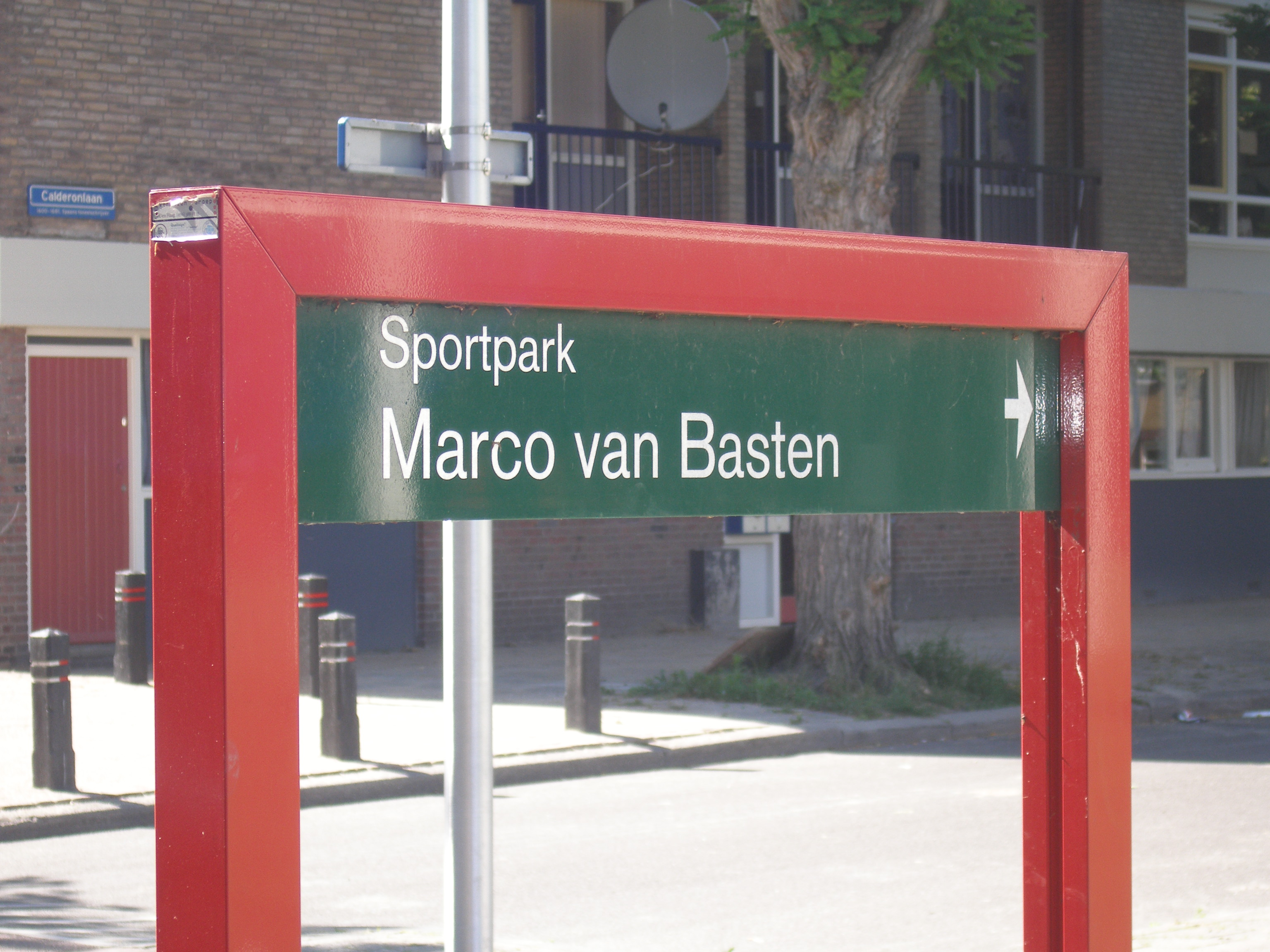 wegwijzing naar Marco van Basten Sportpark. Cervanteslaan, Utrecht